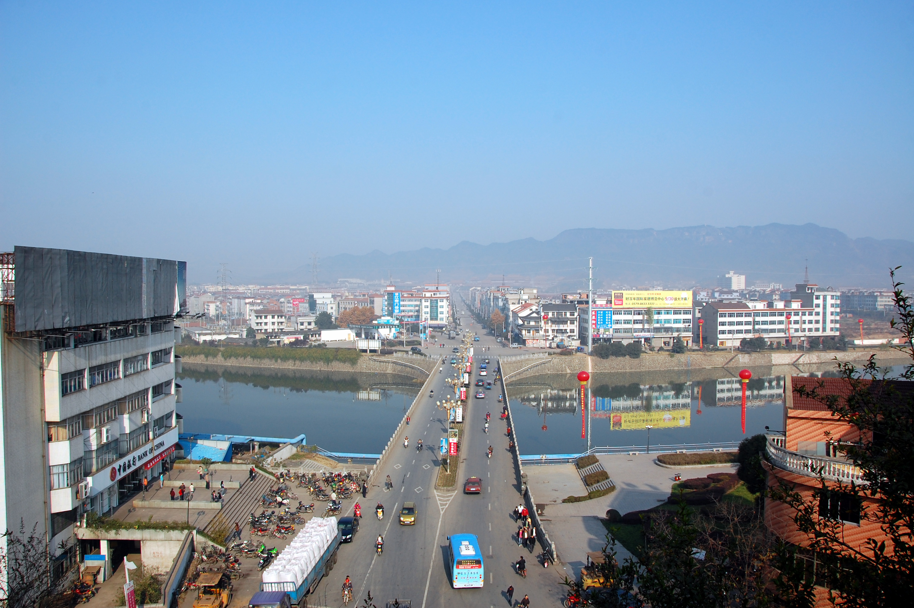 Hengdian, dans la ville-district de Dongyang, province du Zhejiang